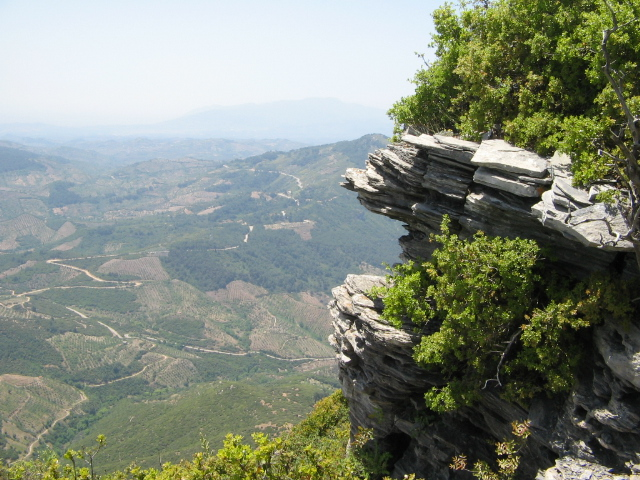 35900 Akçaşehir/Tire/İzmir, Turkey